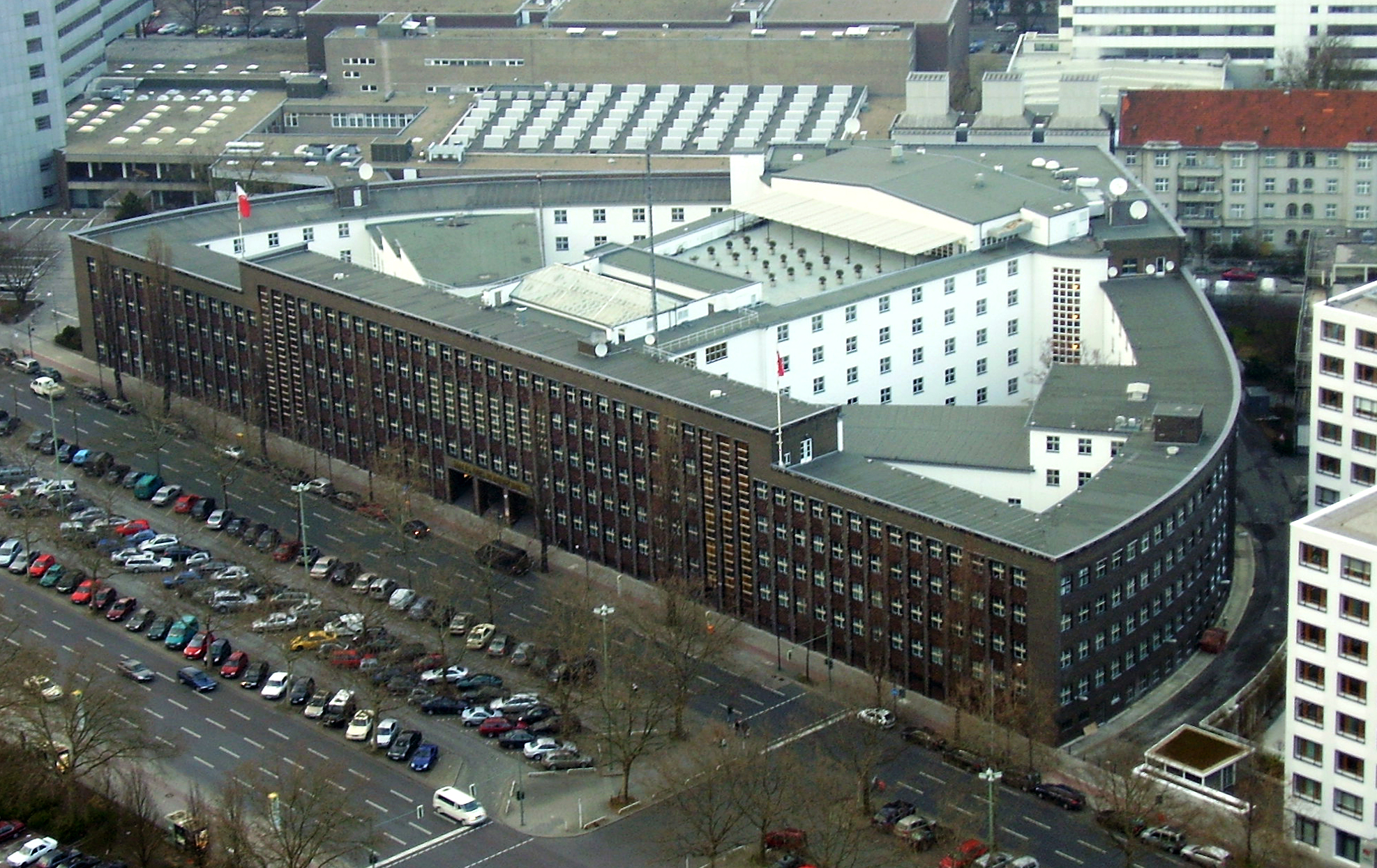 Berlin, Haus des Rundfunks.